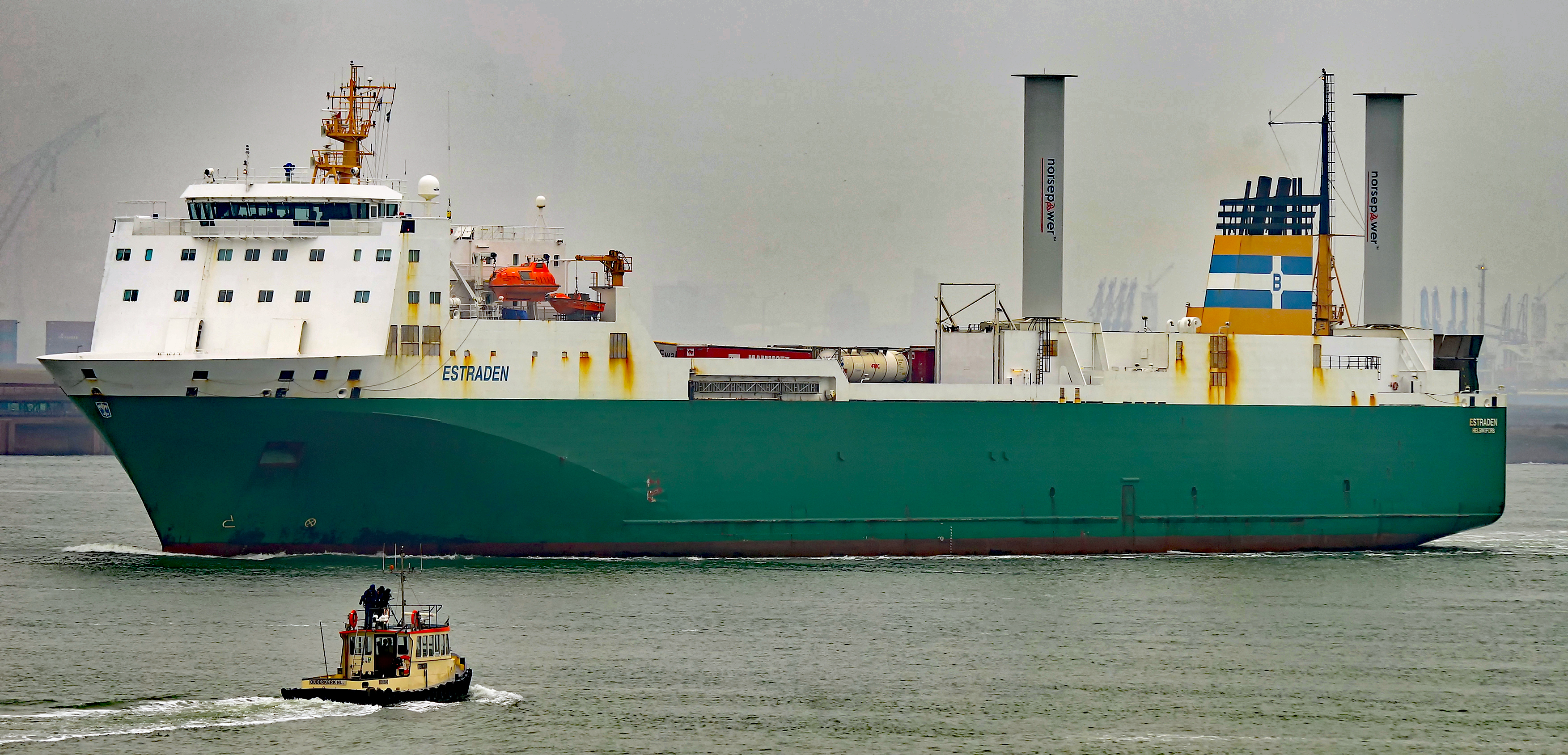 Tender met filmploeg aan boord om de aankomst van de HUGE te filmen.